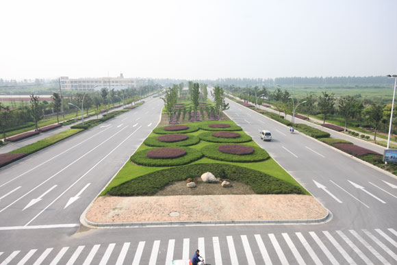 张浦银河路